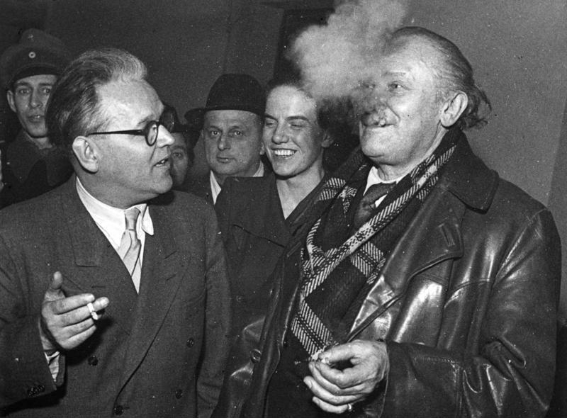 Hamburg, Prozess gegen Veit Harlan Illus-dpd Eugen Klöpfer raucht der Kopf. Kurz vor seiner Vernehmung als Entlastungszeuge im Veit Harlan Prozess hatte der bekannte Schauspieler Eugen Klöpfer am zweiten Verhandlungstag Gelegenheit, auf dem Korridor des Hamburger Schwurgerichts mit seinem Kollegen Veit Harlan (links) eine Wiedersehenszigarette zu rauchen. 4-3-49 [Herausgabedatum] Abgebildete Personen: Klöpfer, Eugen: Schauspieler, Deutschland Harlan, Veit: Schauspieler, Filmregisseur, Deutschland